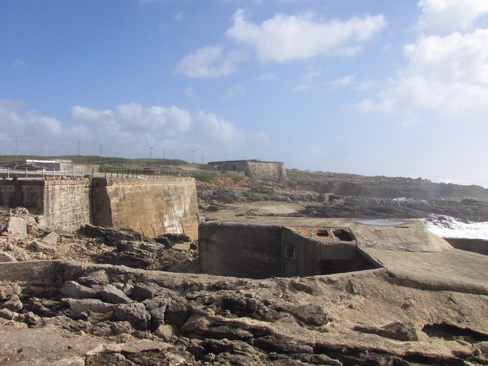 Unmittelbar östlich neben Festungsanlage und Leuchtturm von Cabo Raso finden sich Bunker für den Uferschutz am Atlantik - Cascais Portugal Foto Wolfgang Pehlemann Steinberg IMG_8581